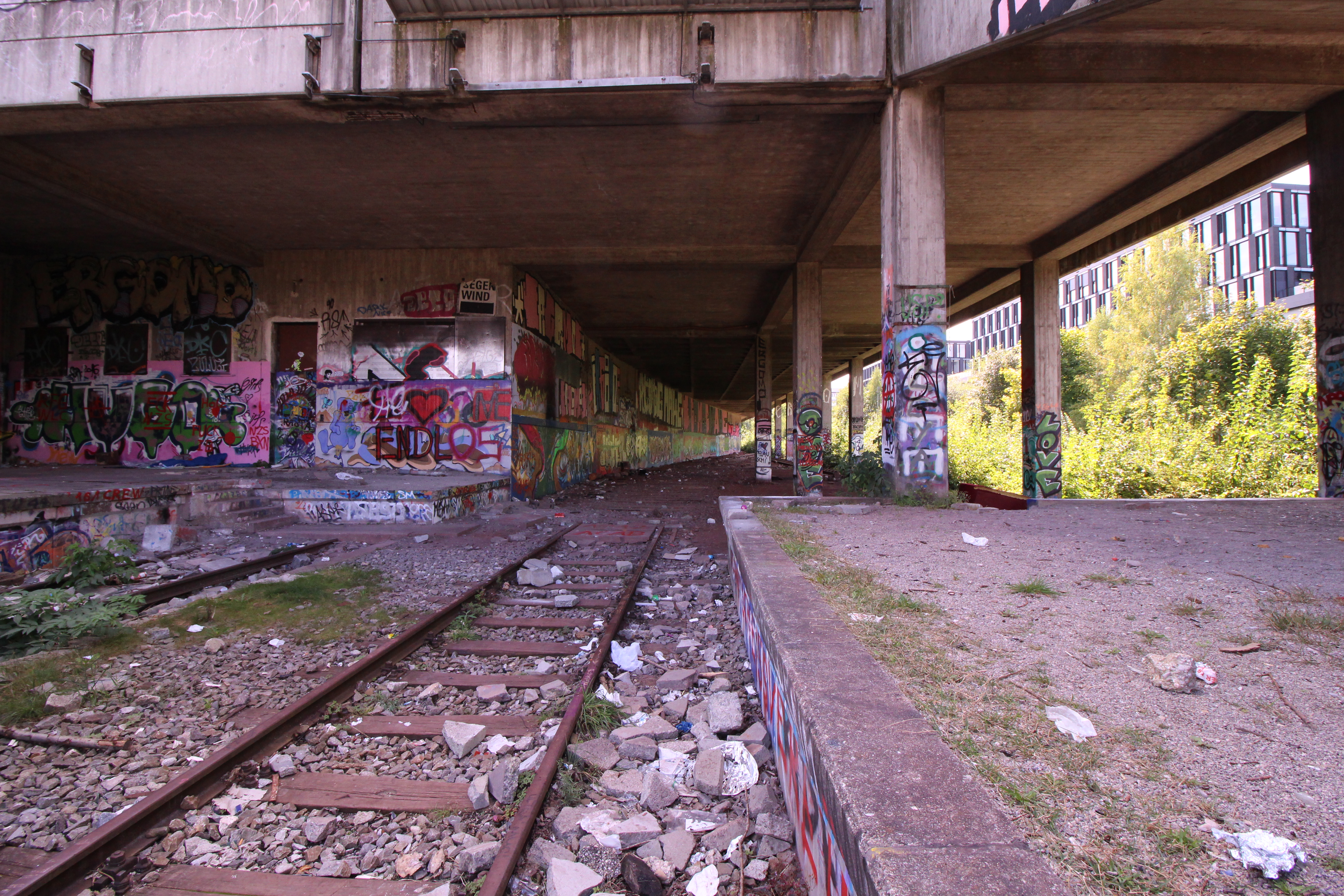 Besprayte Wände am ehemaligen und inzwischen dem Verfall freigegebenen S-Bahnhof Olympiastadion in München.